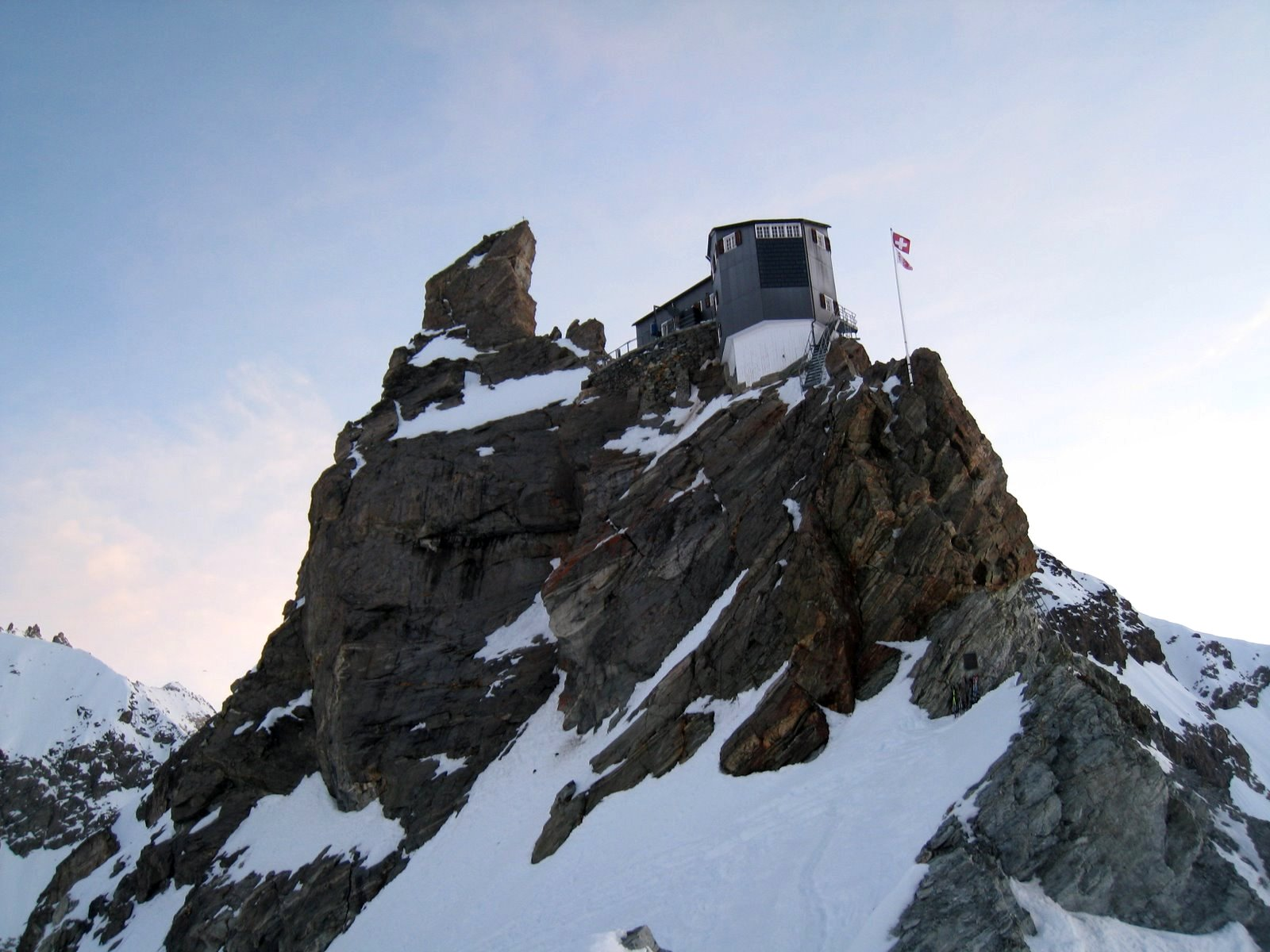 Cabane de Bertol, Alpes valaisannes